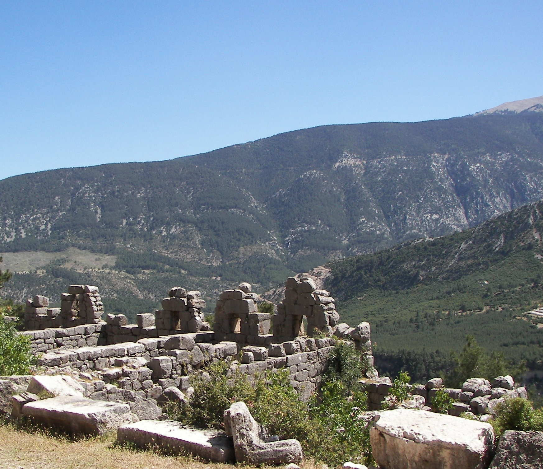 Arykanda Thermen